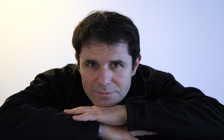 Portrait 2014